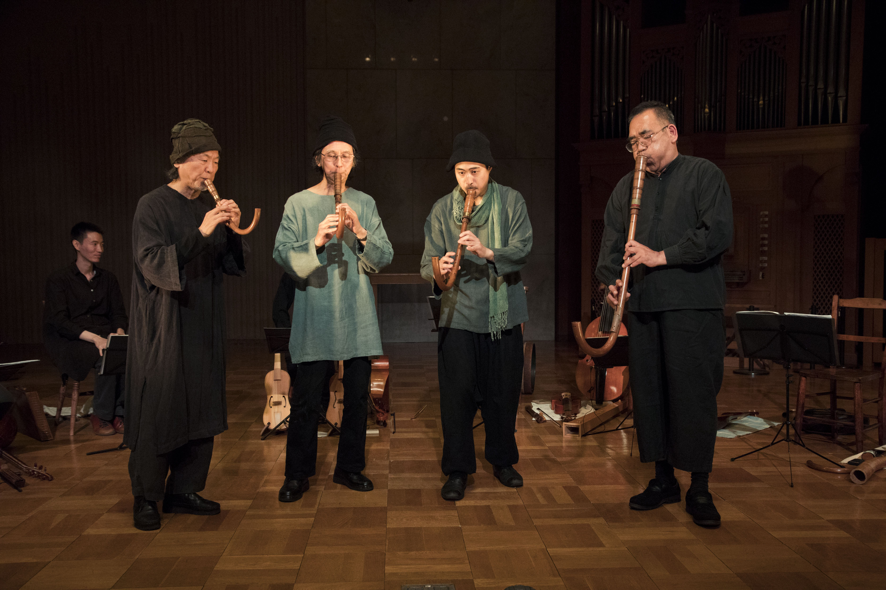 クルムホルンコンソート